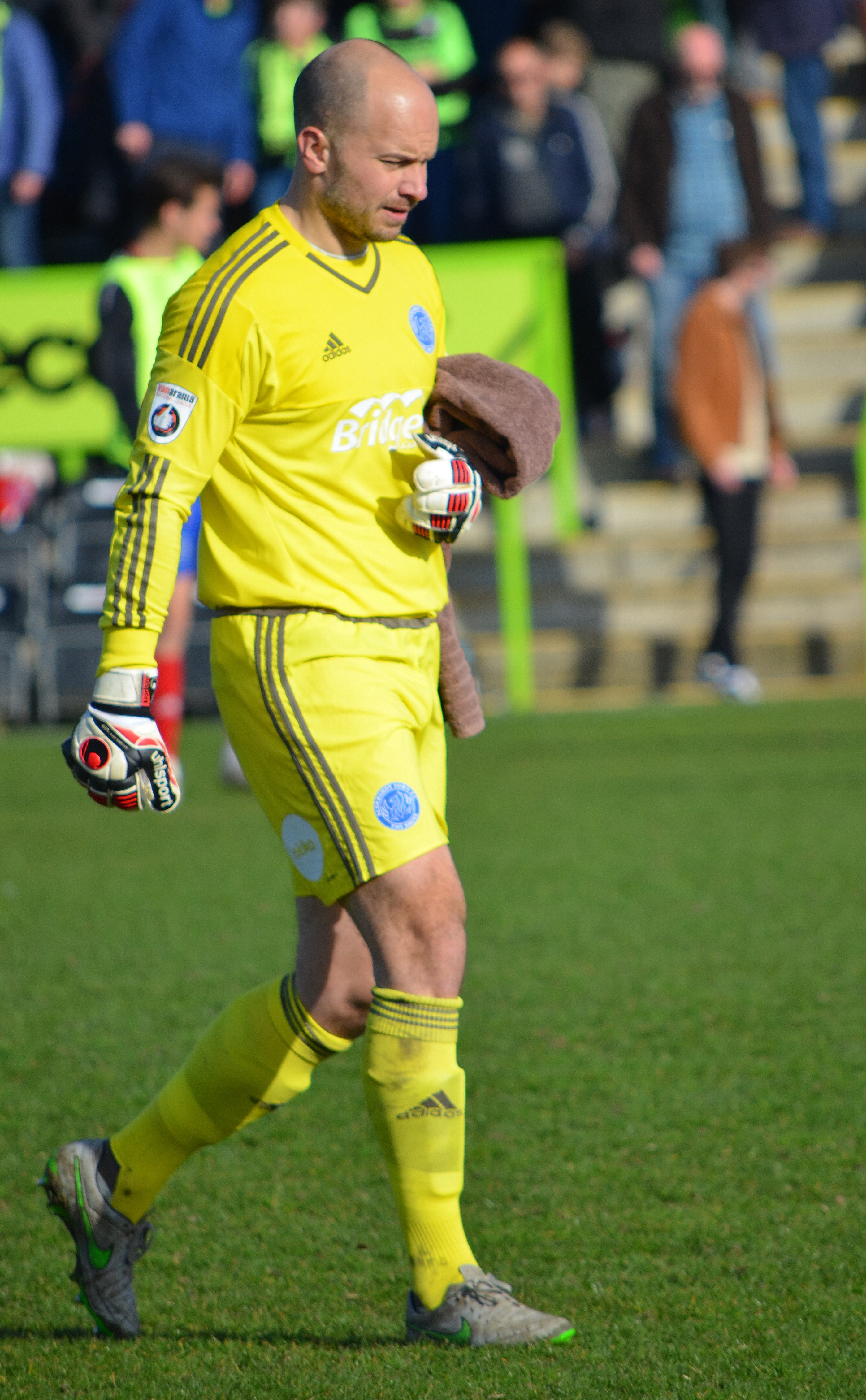 Forest Green Rovers V Aldershot